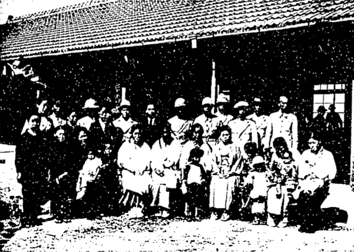 中文（台灣）: 榮村為台南州莿桐庄和虎尾街的日本移民村，此圖為榮村的出征家族合照